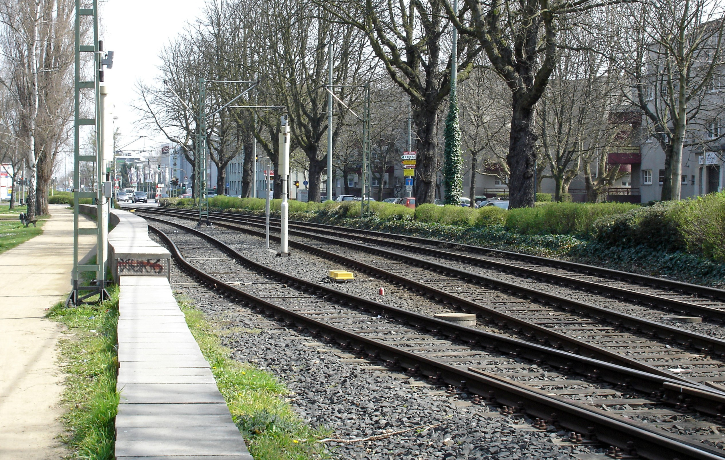 Abstellgleis zwischen Station Schaefflestrasse und Gwinnerstrasse, in Ffm-Riederwald, Blick-Richtung: Osten